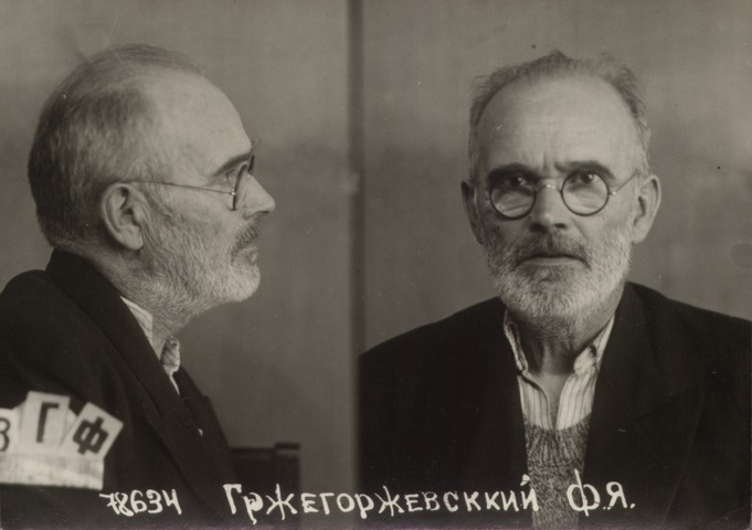 Франц Янович Гжельщак, псевдонимы Марцин Гжегожевский, Механик (1 января 1881—25 декабря 1937) — активист СДКПиЛ и КПП. Деятель Коминтерна и Профинтерна.